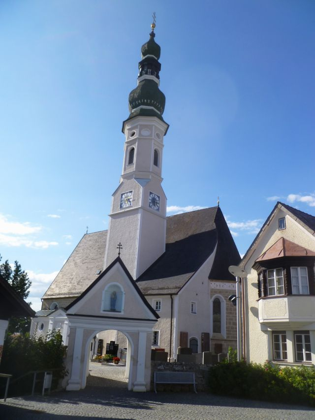 Kath. Pfarrkirche hl. Michael, Friedhof und Friedhofsmauer